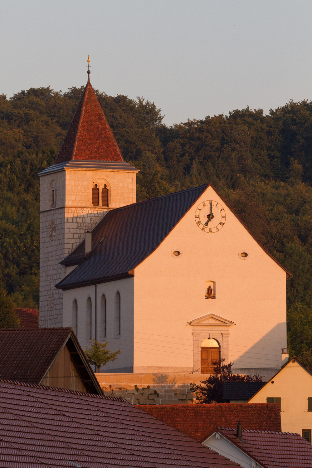 Eglise Saint-Jean-devant-la-Porte-Latine à Coeuve (JU)